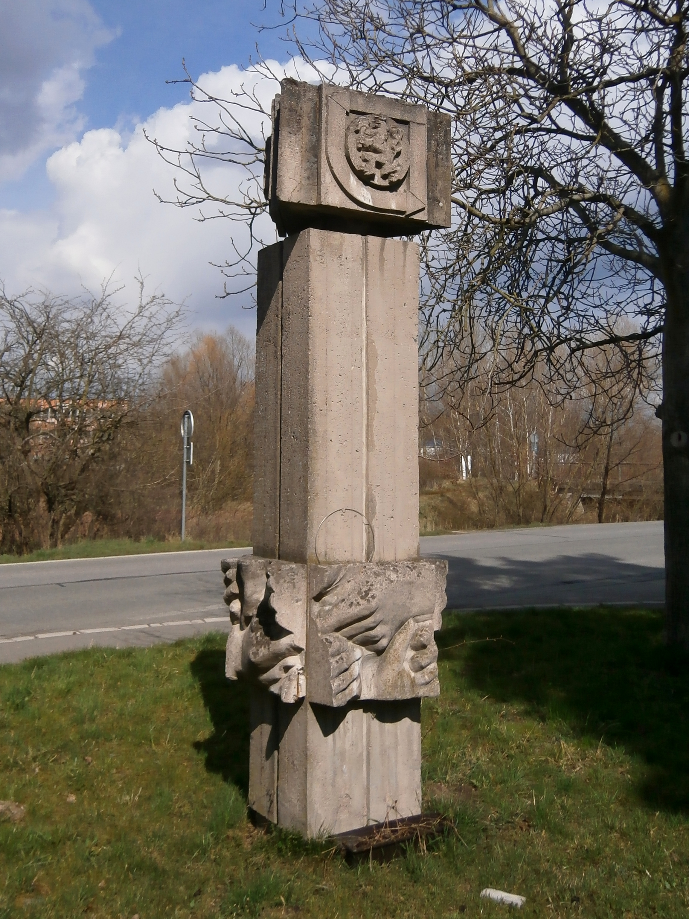 Plastika se řeznickými motivy u bývalého masokombinátu